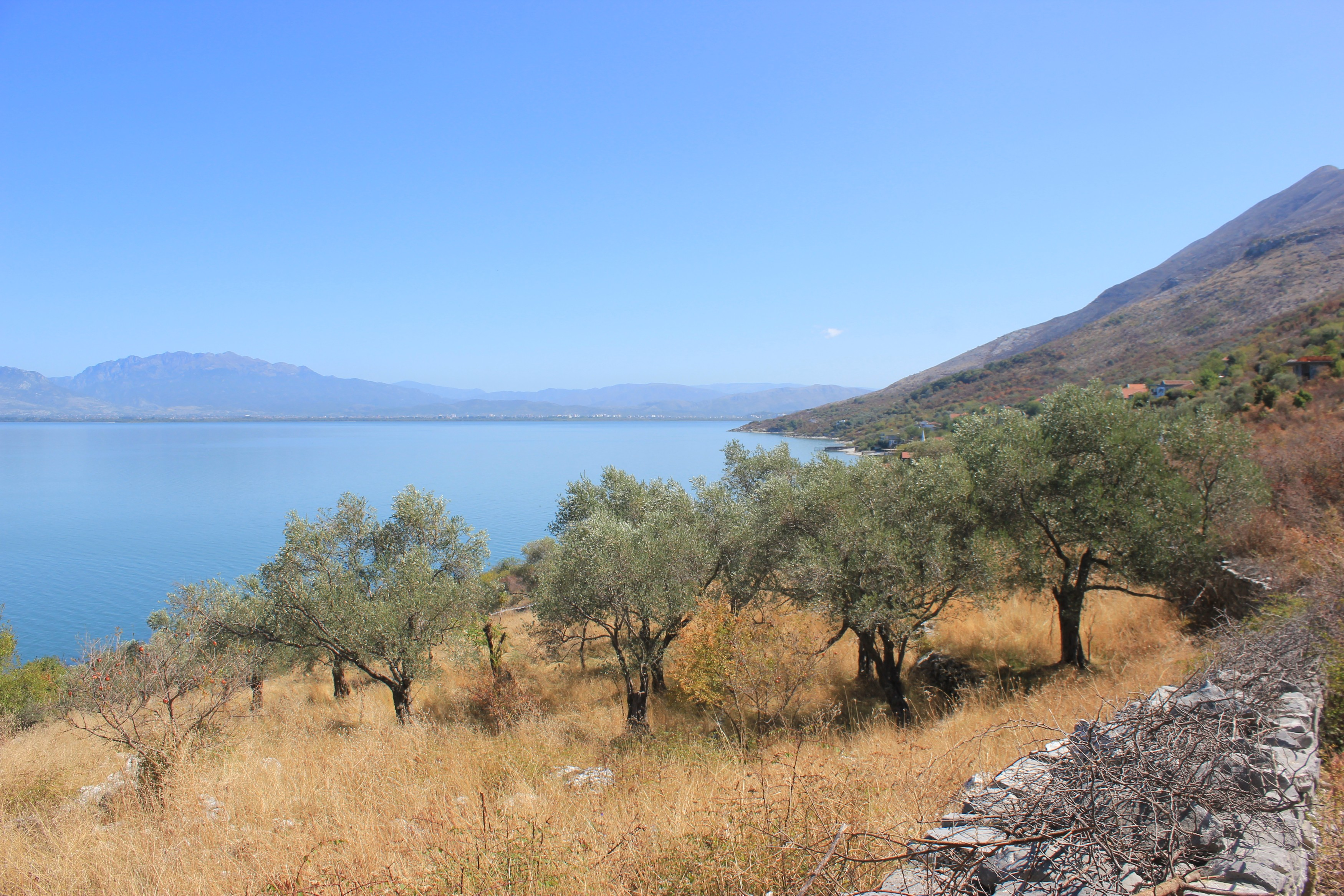 Am Skutarisee bei Zogaj, Albanien.